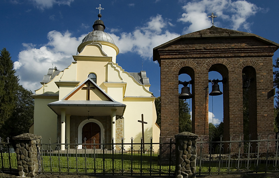 Cerkiew w Olszanicy w województwie podkarpackim